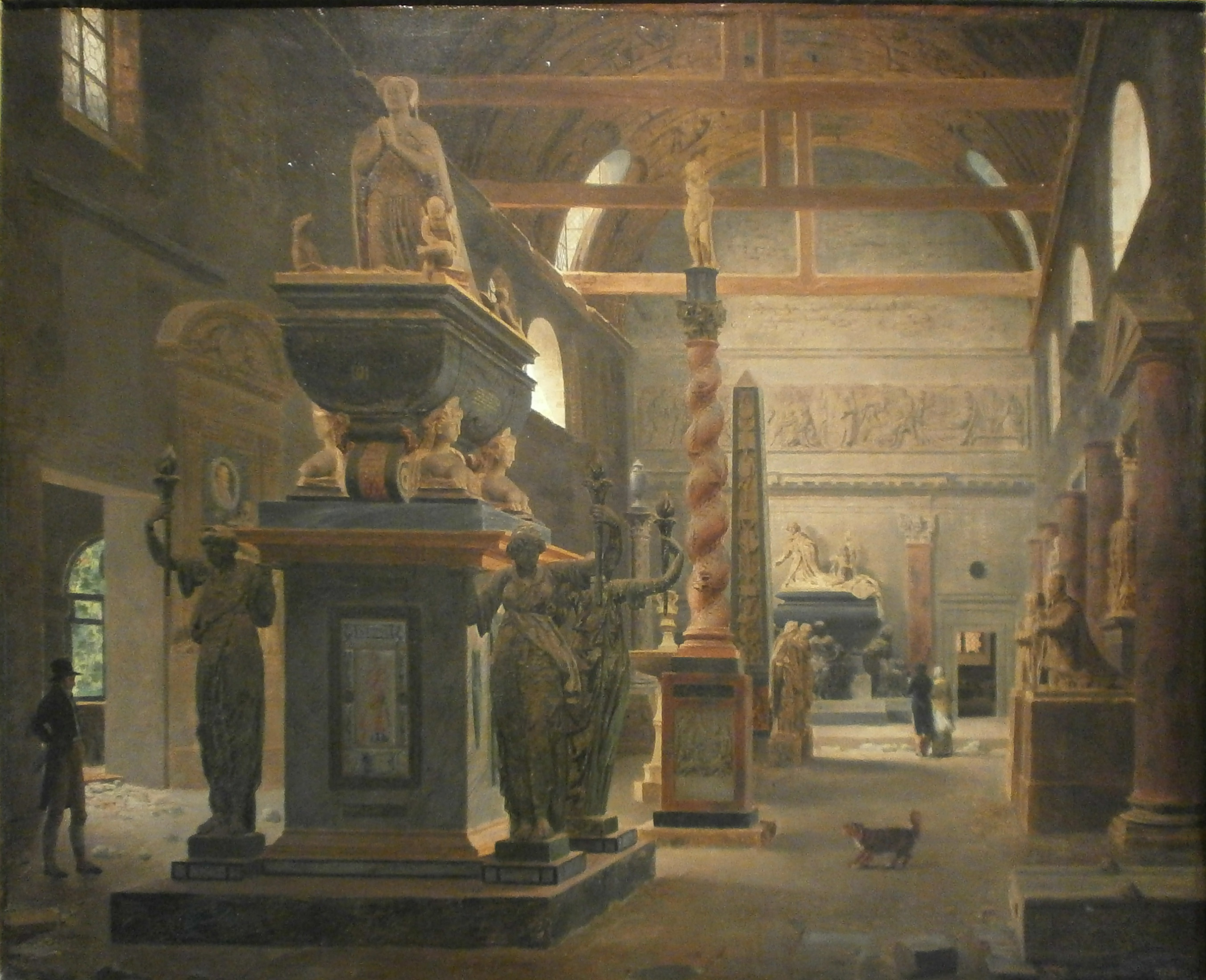 tombeau de Diane de Poitiers, cariatides de la châsse de sainte Geneviève. Au fond, tombeau de Mazarin par Coysevox